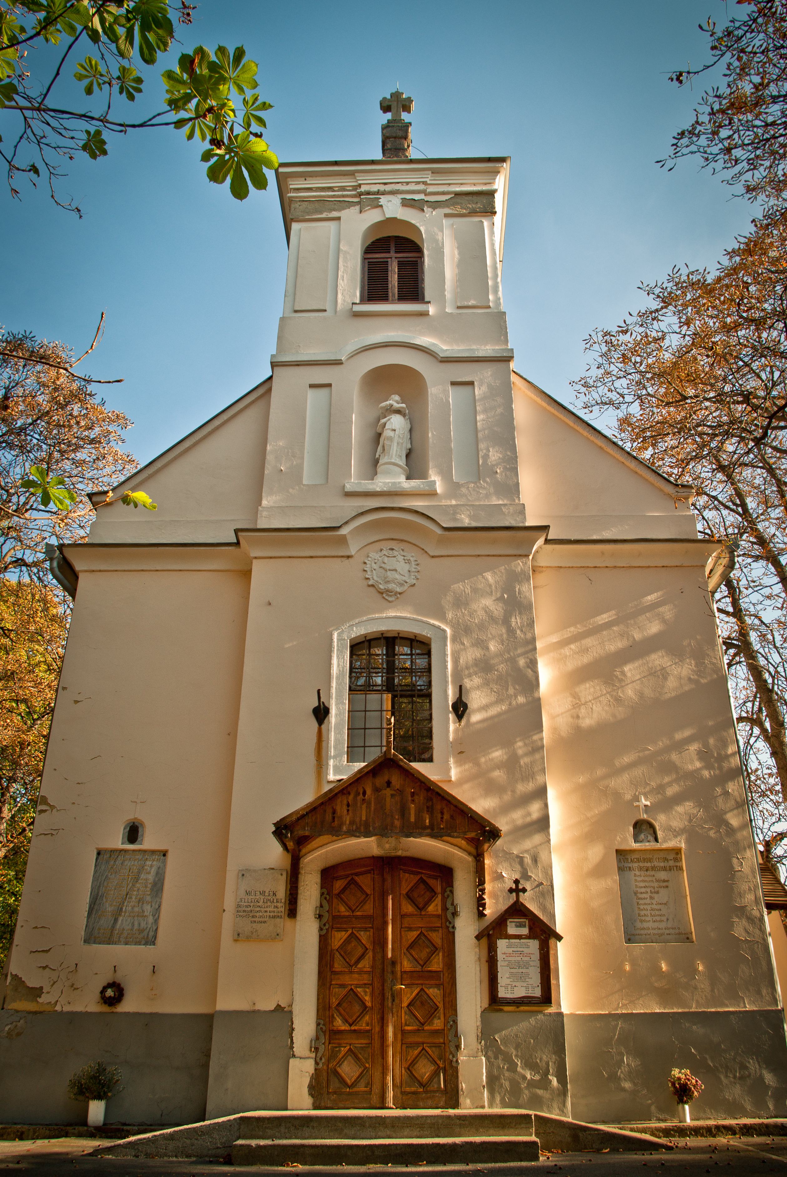 R. k. templom (Keresztelő Szent János) (Gyöngyös, (Mátrafüred) Parádi út)